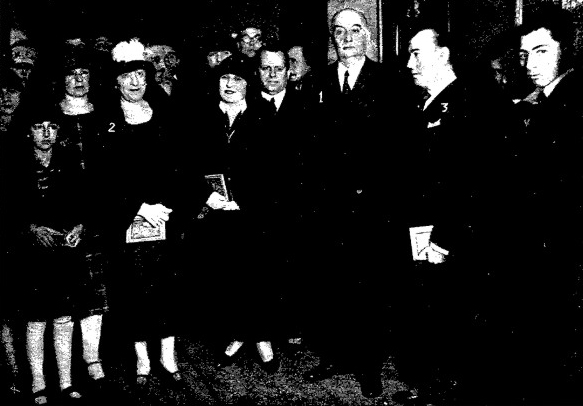 Buenos Aires: Presidente Marcelo T. de Alvear, su esposa Regina, el presidente de la comisión nacional de Bellas Artes ignagurando la exposición nacional de pintura y escultura que todos los años se celebra. Artículo diario español ABC.